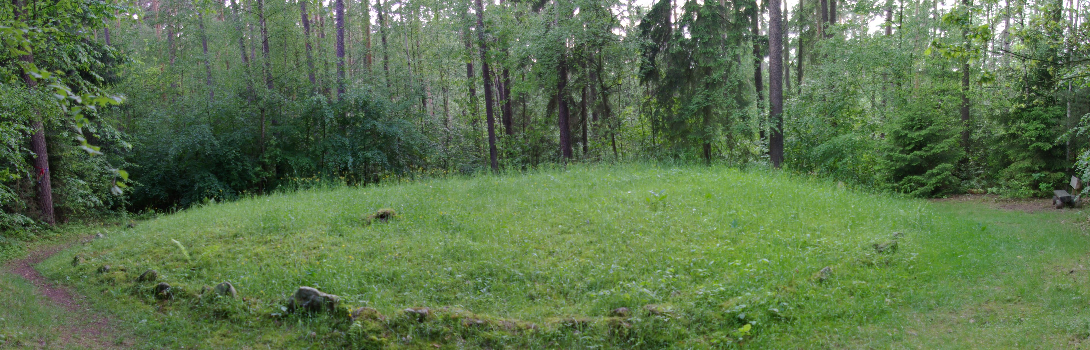 Hügelgrab aus der Hallstattzeit im Erlanger Stadtteil Kosbach. Dahinter befindet sich (auf dem Foto nicht sichtbar) der Kosbacher Altar.